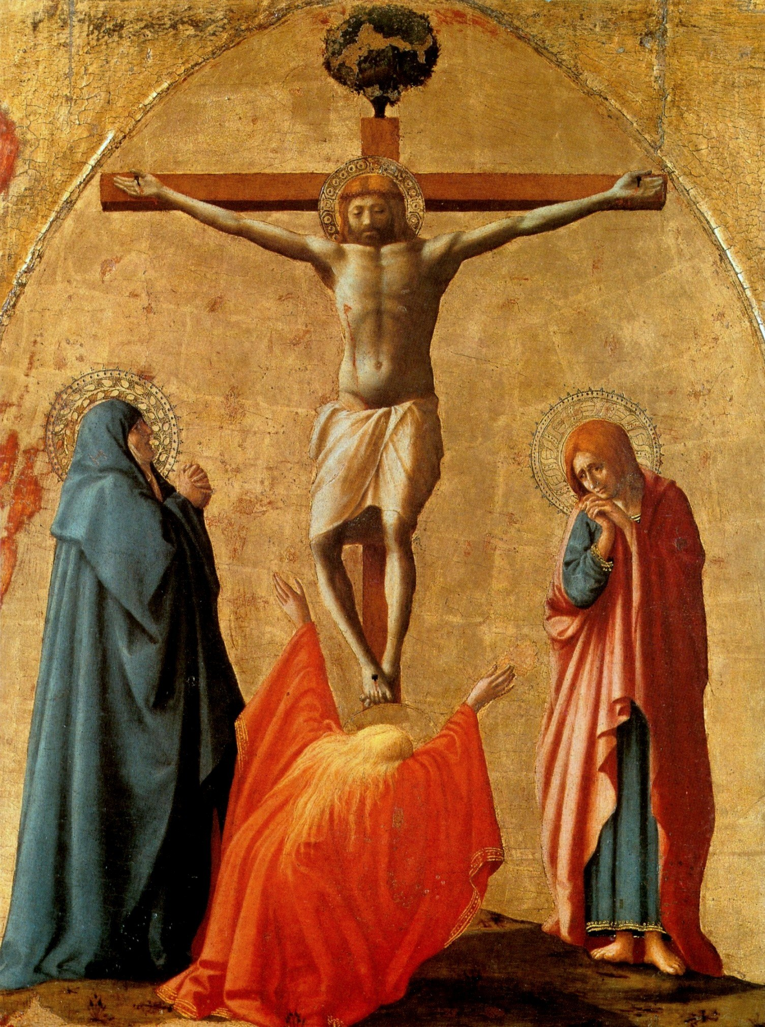 Tafel vom oberen Teil des Altars für S.Maria del Carmine, Pisa.